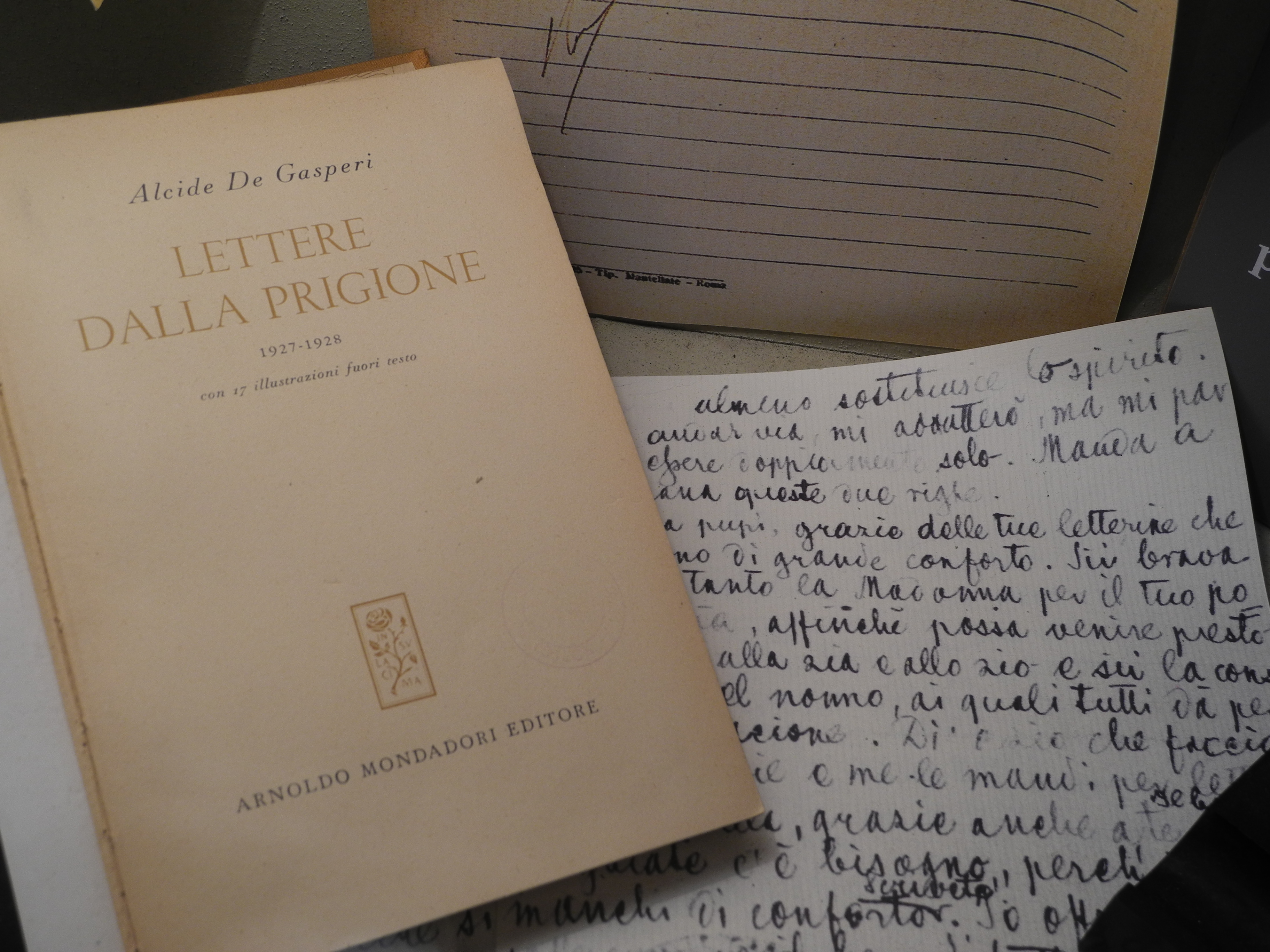 Lettere scritte da Alcide De Gasperi durante la prigionia